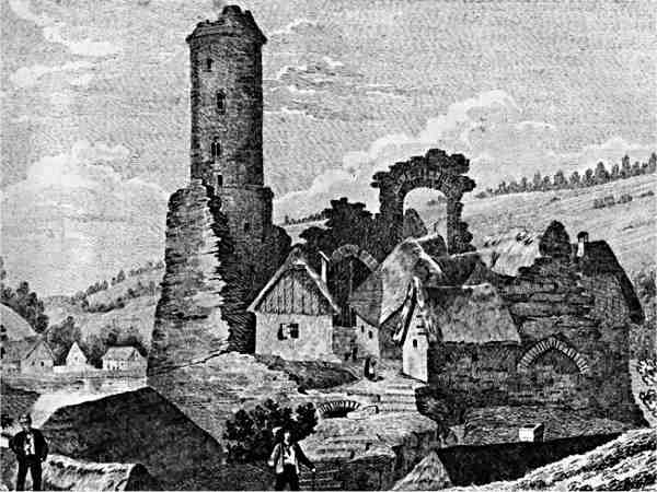 Rytina hradu Jenštejn z roku 1795, autor J. Farka